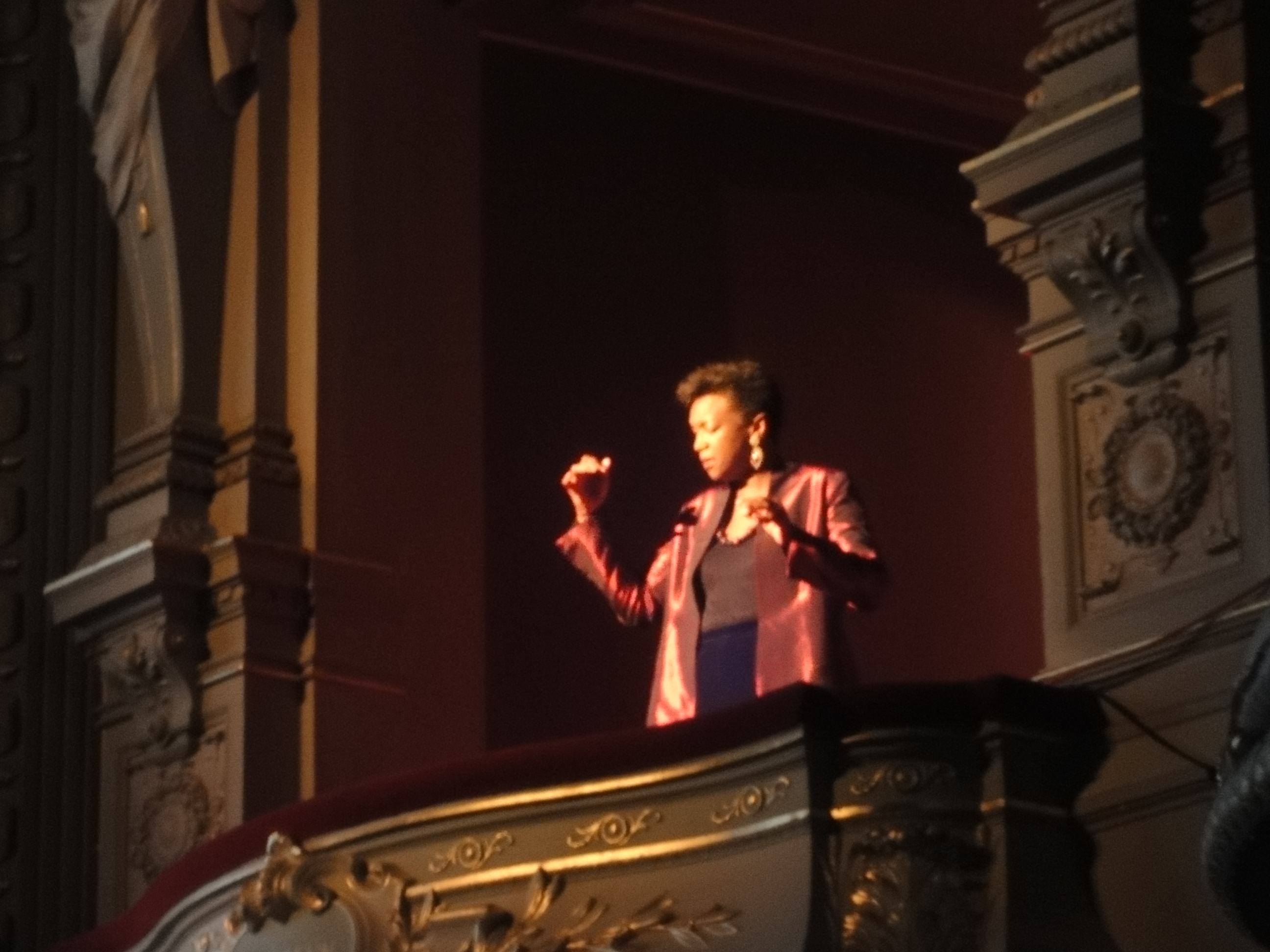 Claron McFaddon singing in the Stadsschouwburg Amsterdam during TEDxAmsterdam 2010